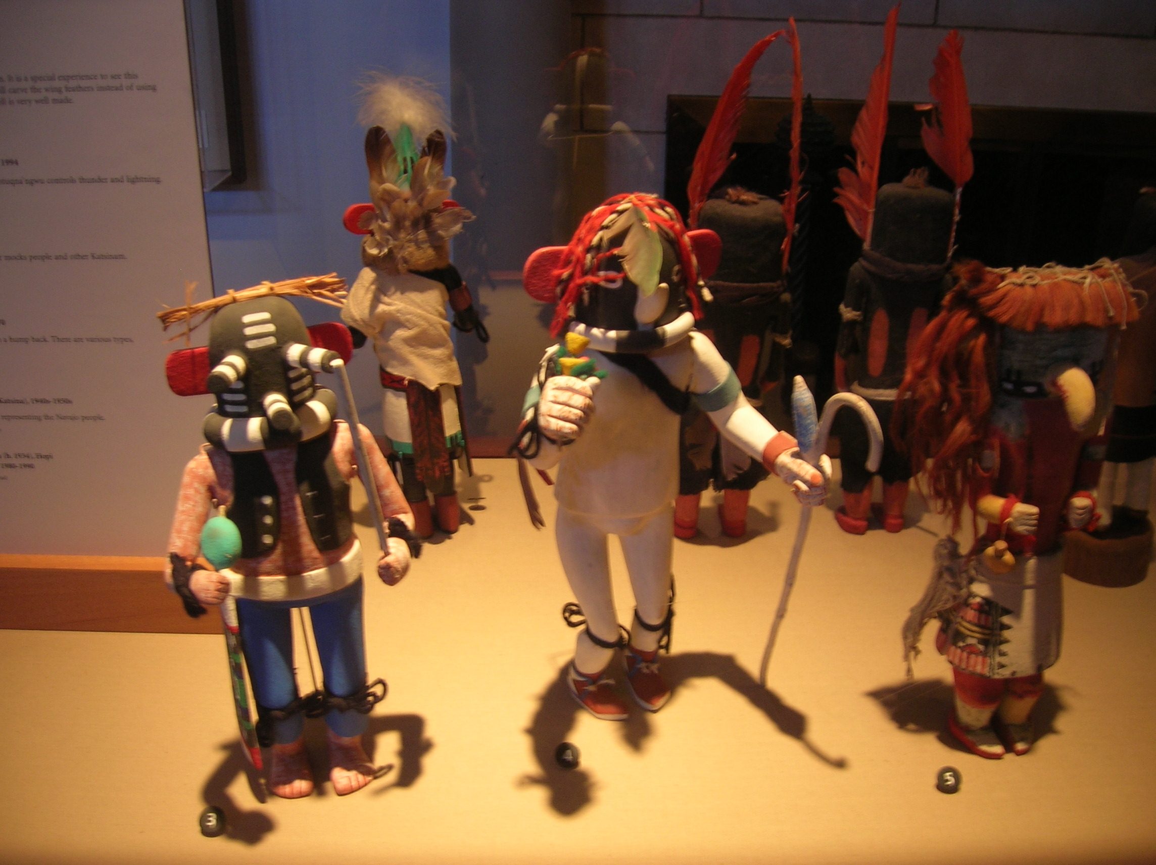 Kachina Dolls, Heard Museum, Phoenix, AZ, USA